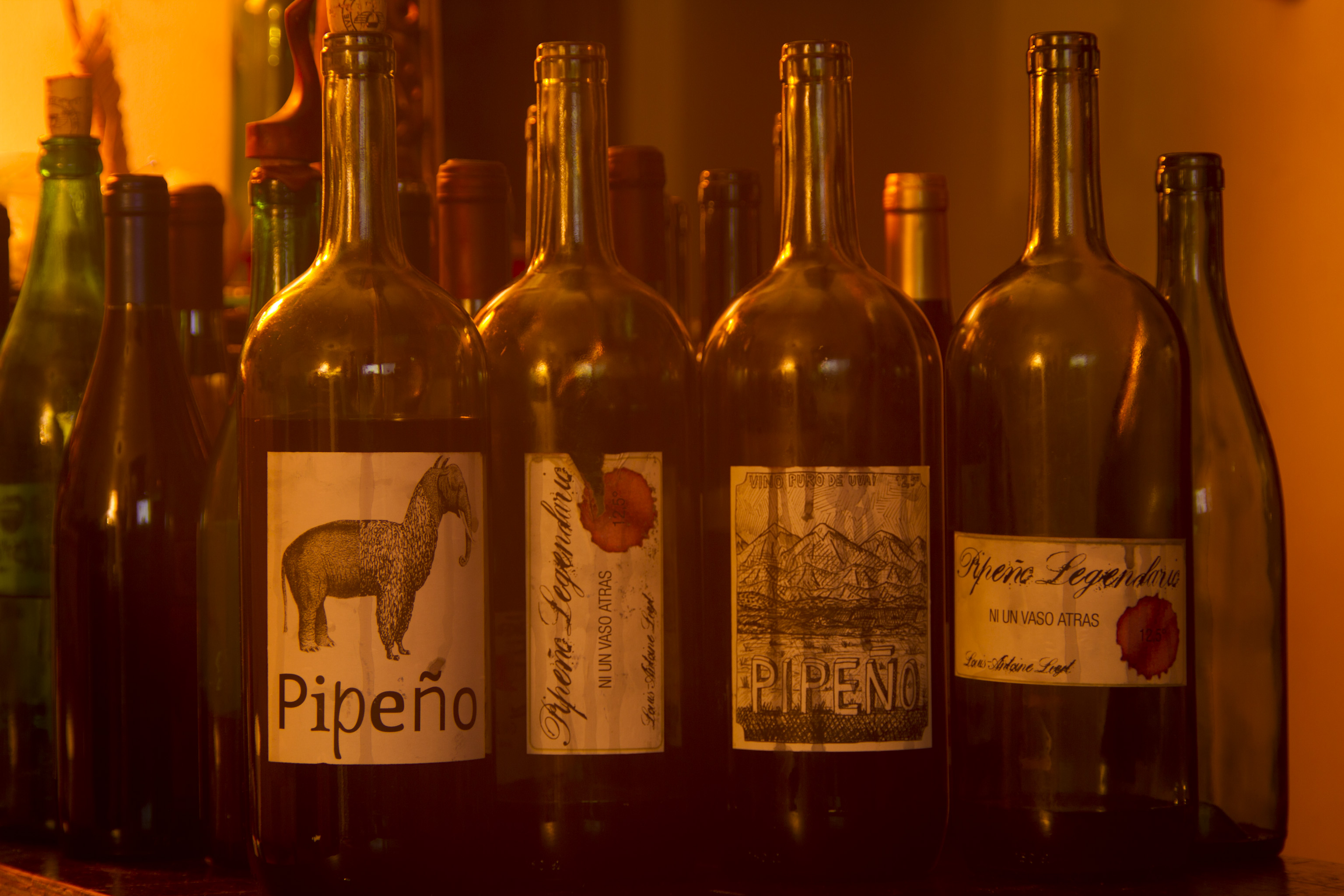 Pipeños en casa luego de una cata de vinos.